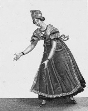 Amélie-Julie Candeille (1767-1834) acting in « Catherine ou la Belle fermière » on the stage of the Théâtre-Français